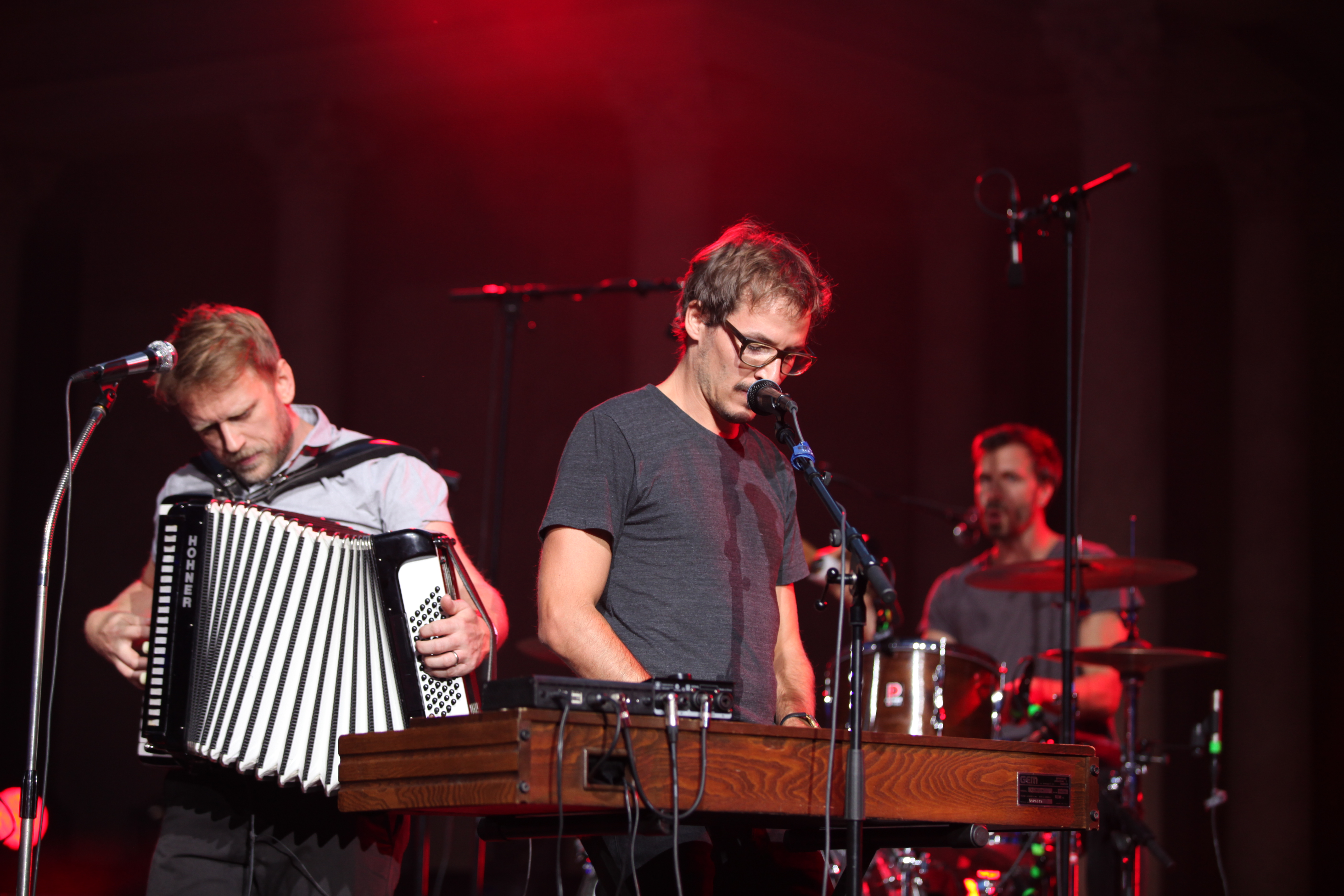 garish auf dem Heimatsound-Festival 2015 in Oberammergau Thomas Jarmer Julian Schneeberger an einer GEM Rodeo 49 Markus Perner